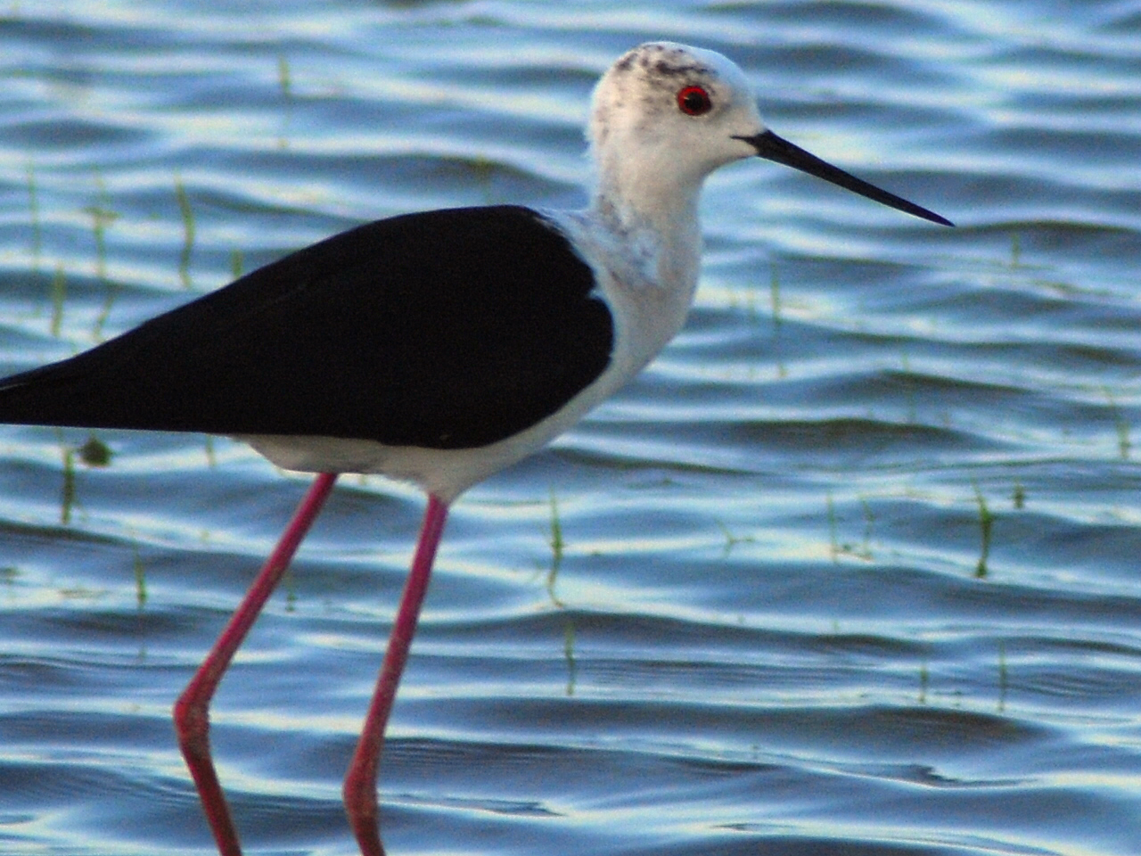 Himantopus himantopus, Albufera de Valencia, Spain